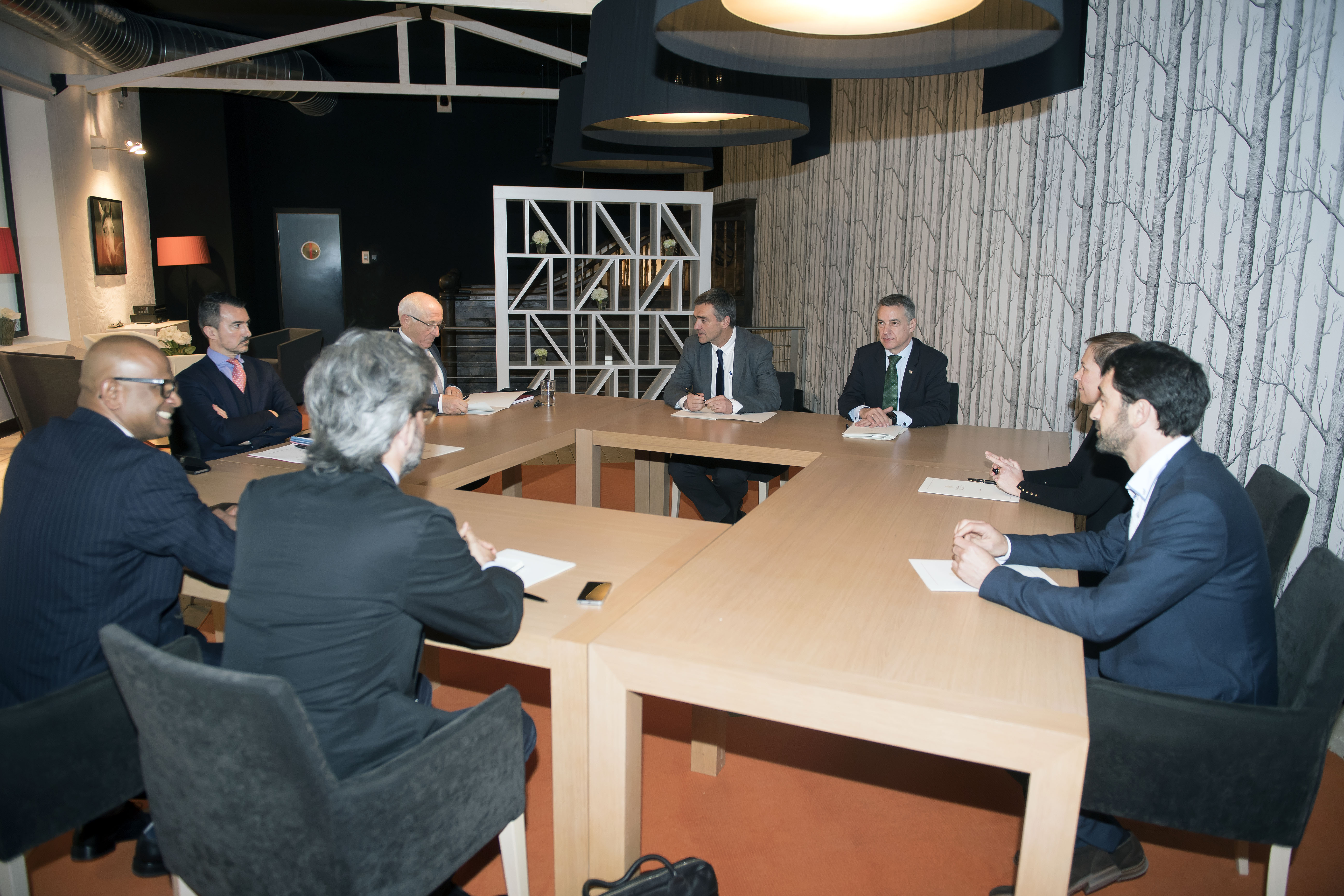 Este pasado miércoles, el Lehendakari Iñigo Urkullu, la Presidenta del Gobierno de Navarra, Uxue Barkos y el Presidente de la Mancomunidad de Iparralde, Jean René Etchegaray mantuvieron una reunión de trabajo con el Coordinador de la Comisión Internacional de Verificación (CIV), Ram Manikkalingam. El lehendakari Iñigo Urkullu, estuvo acompañado por el secretario general para la Paz y la Convivencia, Jonan Fernandez; la presidenta del Gobierno de Navarra; Uxue Barkos, estuvo acompañada por el director general de Paz, Convivencia y Derechos Humanos, Alvaro Baraibar; y el presidente de la Mancomunidad de Iparralde, Jean René Etchegaray, estuvo acompañado por su jefe de gabinete, Marc Amestoy.